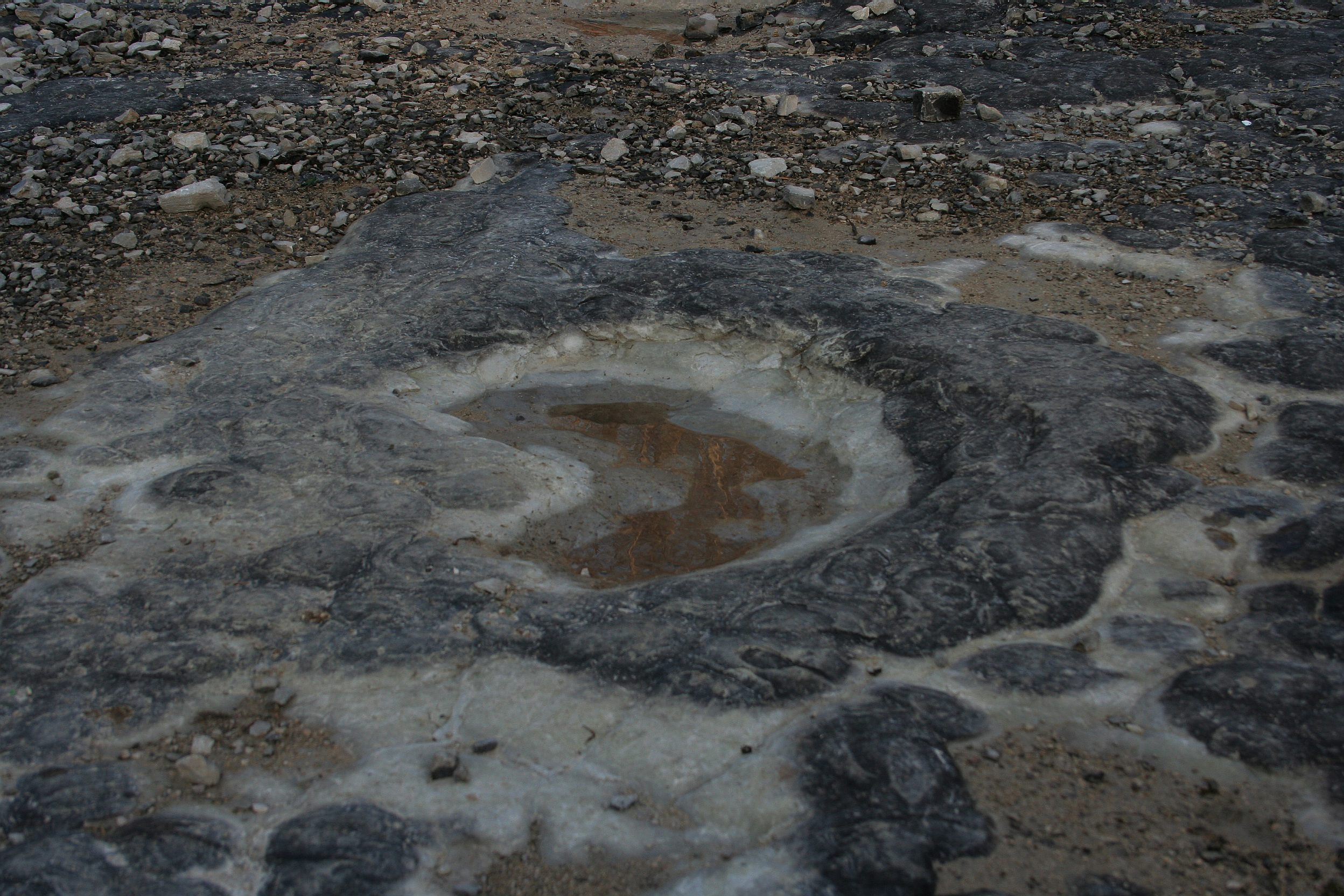 Dinosaure footprint Loulle 39 France 3 dec 2006 photo by Jean-Francois Gaffard Jeffdelonge